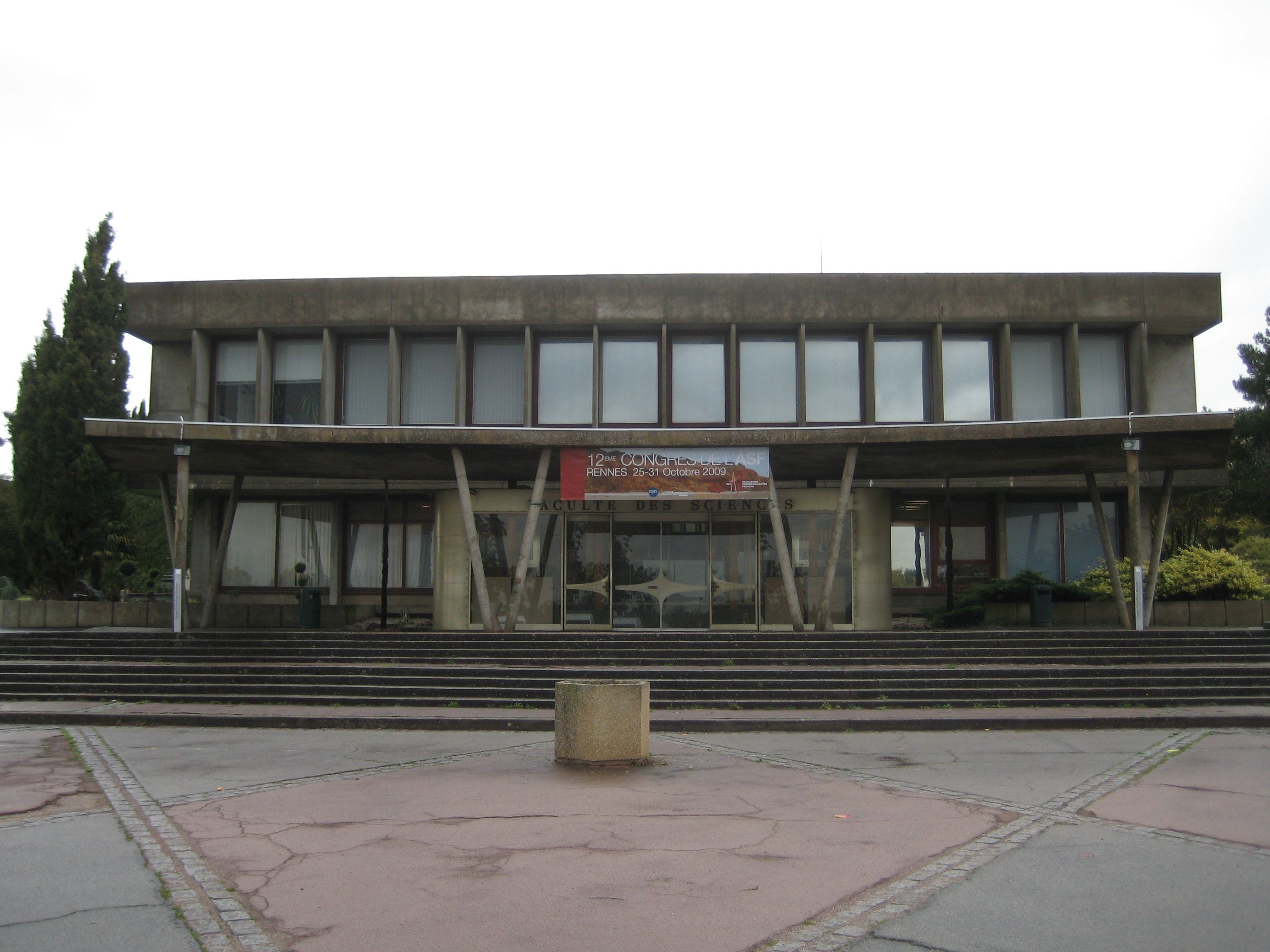 Batiment de la scolarité, Université de Rennes 1